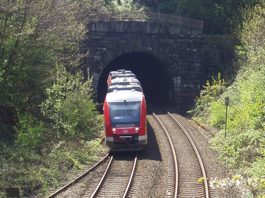 Volmetalbahn verlässt den Goldbergtunnel in Richtung Hagen Hauptbahnhof am 23. April 2005, 12:45 Uhr.